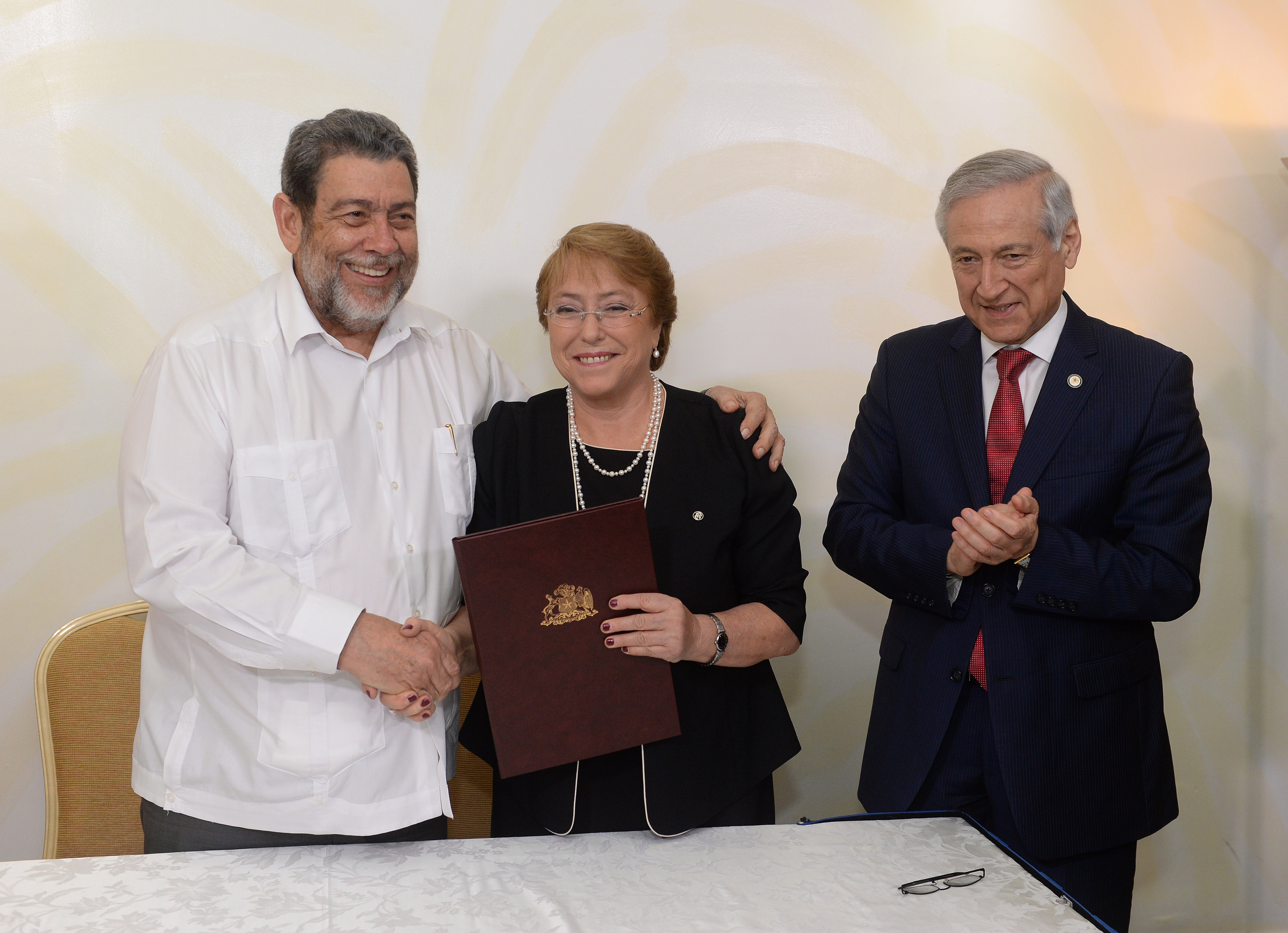 Jefa de Estado se reúne con líderes del CARICOM en Guyana